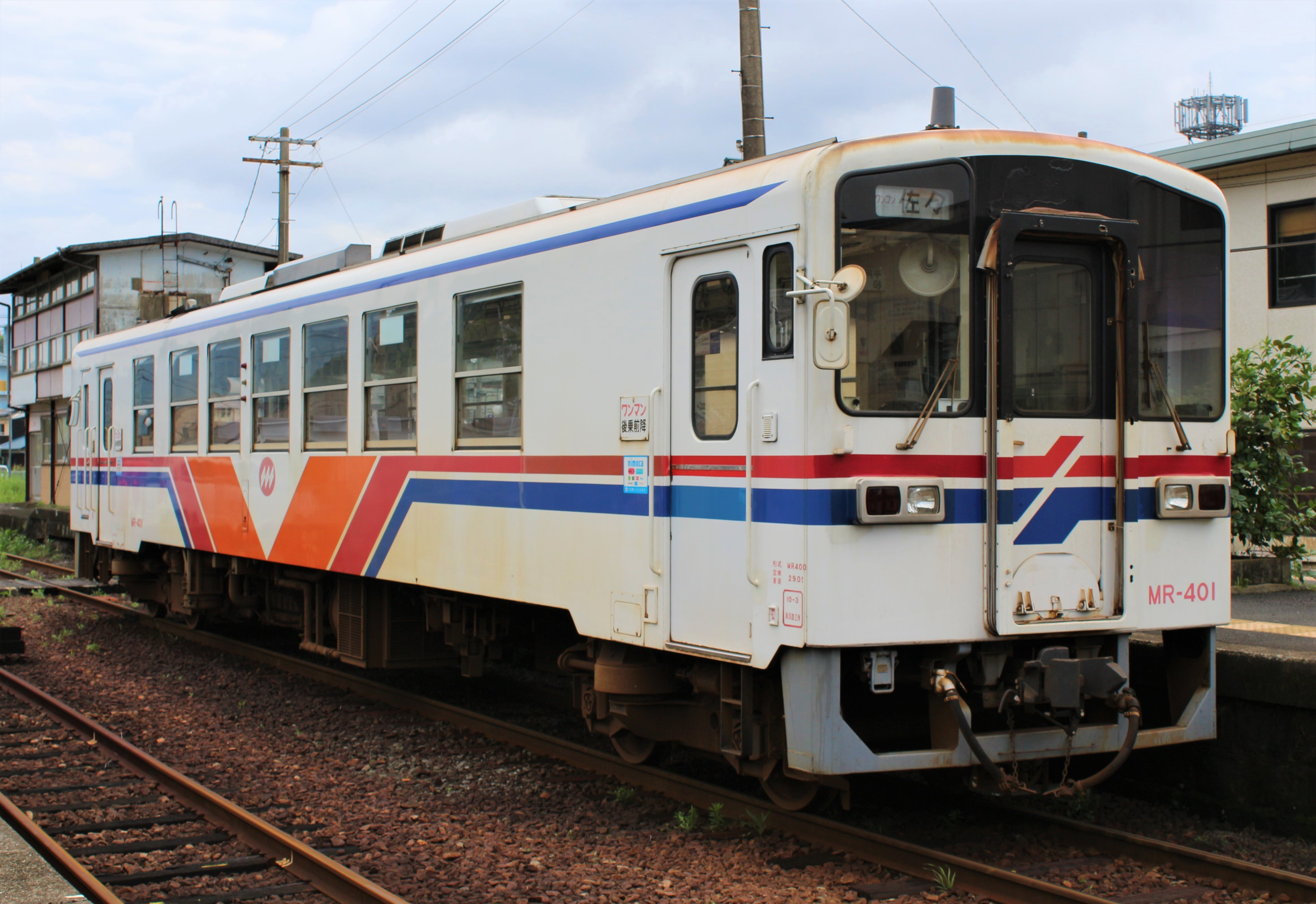 松浦鉄道MR-400形気動車401 Canon EOS Kiss X7i